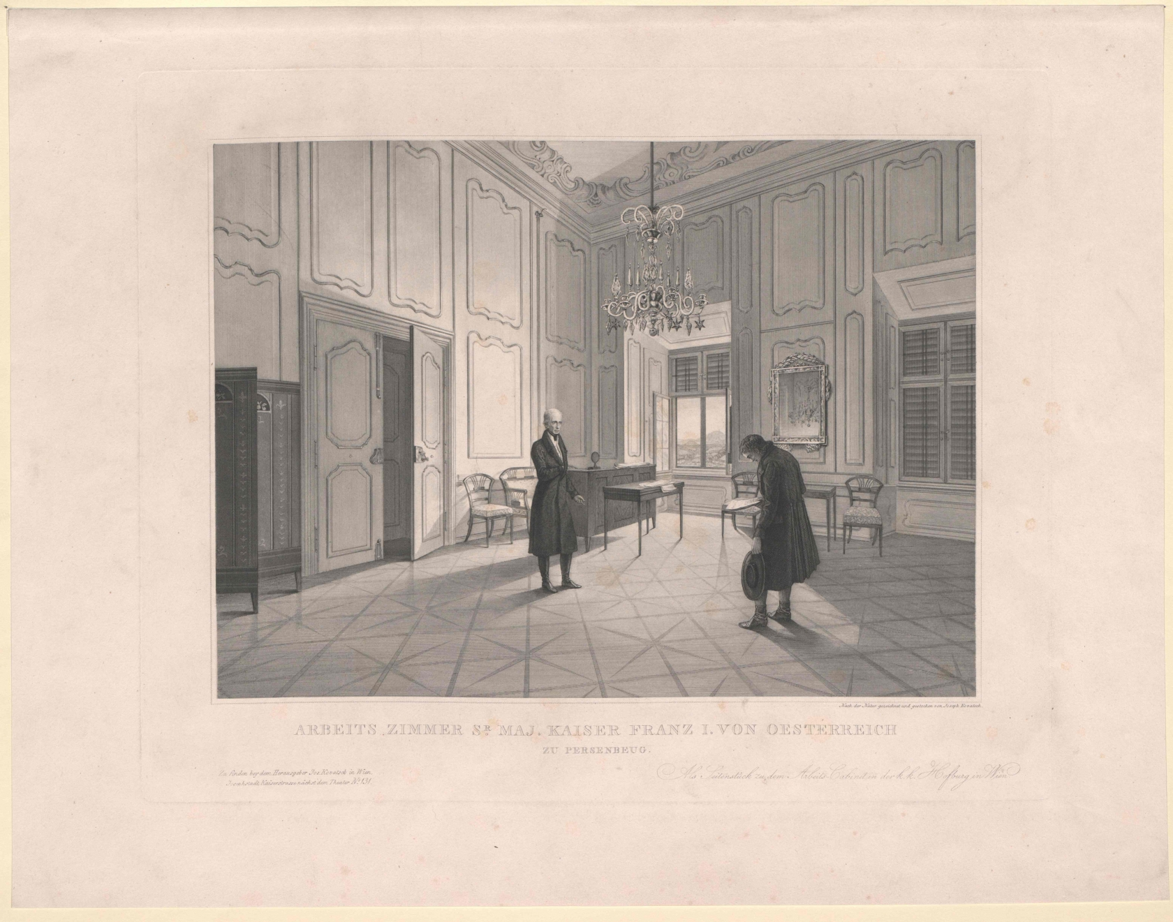 Franz II., römisch-deutscher Kaiser - Arbeitszimmer Seiner Majestät Kaiser Franz I. von Österreich Bildnis in vorgerückten Jahren in seinem Arbeitszimmer auf Schloss Persenbeug einen Bittsteller empfangend. Stahlstich nach eigener Zeichnung von Josef Kovatsch, 1830er Jahre.